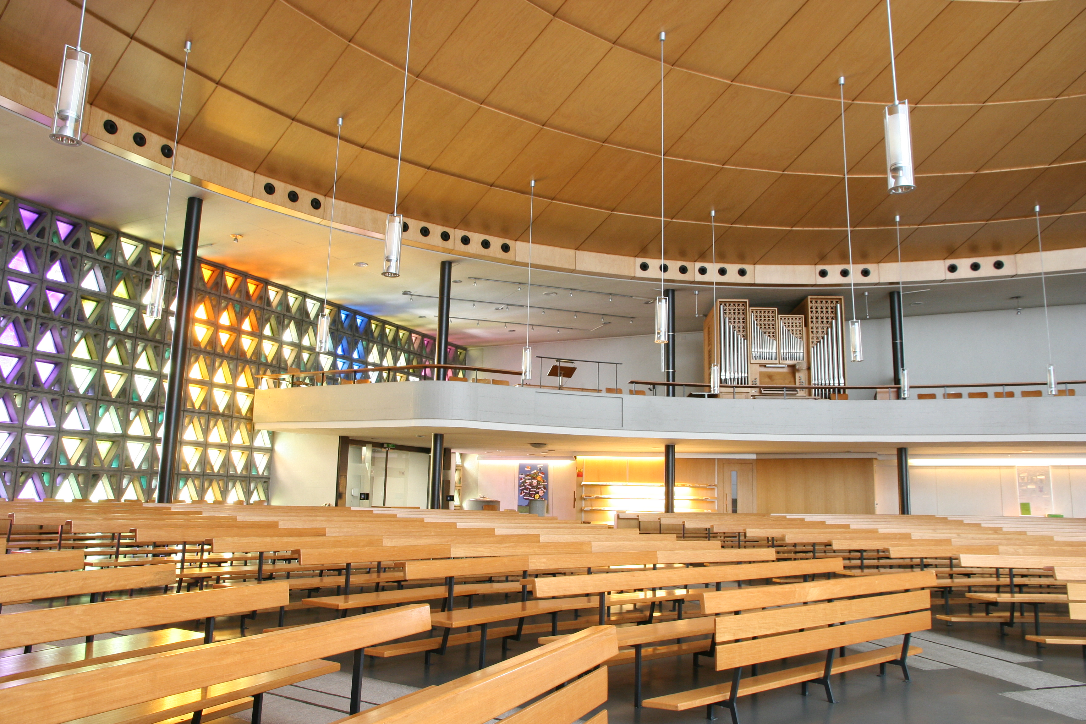 Römisch-katholische Pfarrkirche Bruder Klaus Biel